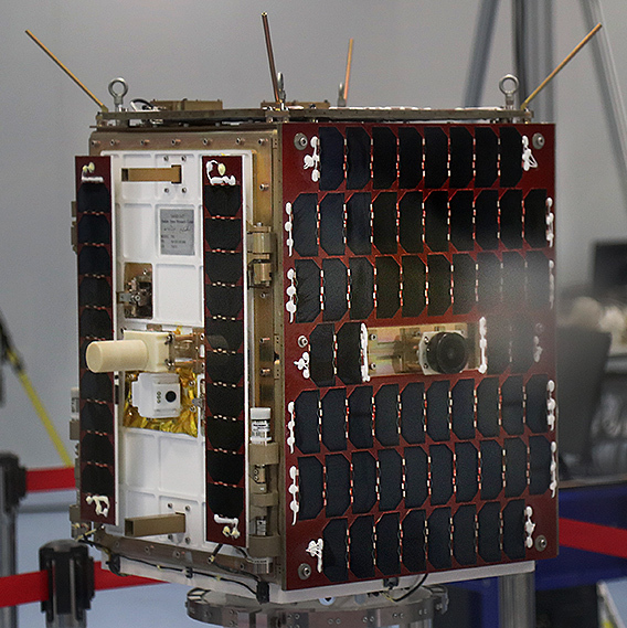 رونمایی از ماهواره مخابراتی ناهید در پژوهشگاه فضایی ایران